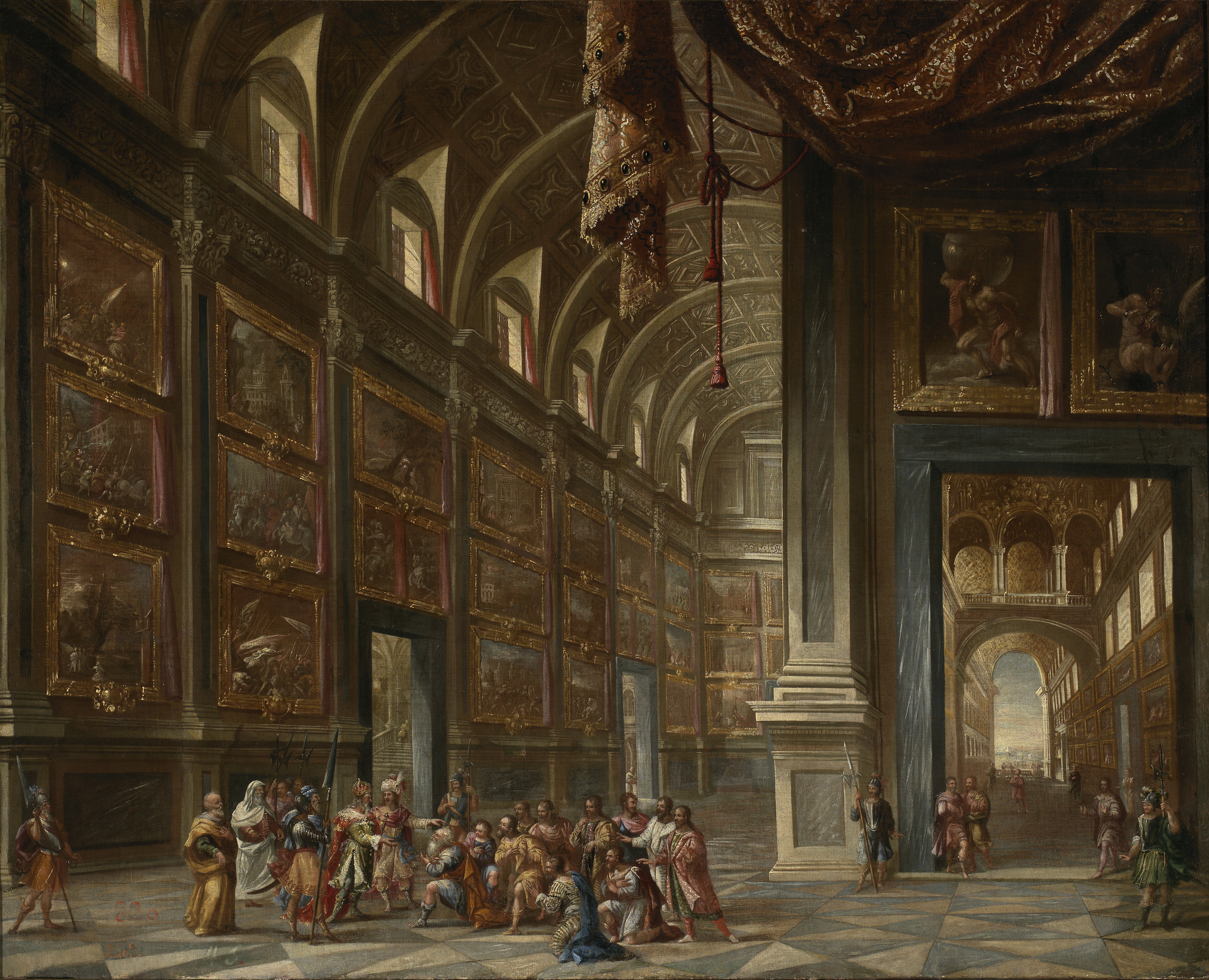 La obra representa al patriarca hebreo José presentando al faraón de Egipto a su padre y a sus hermanos.